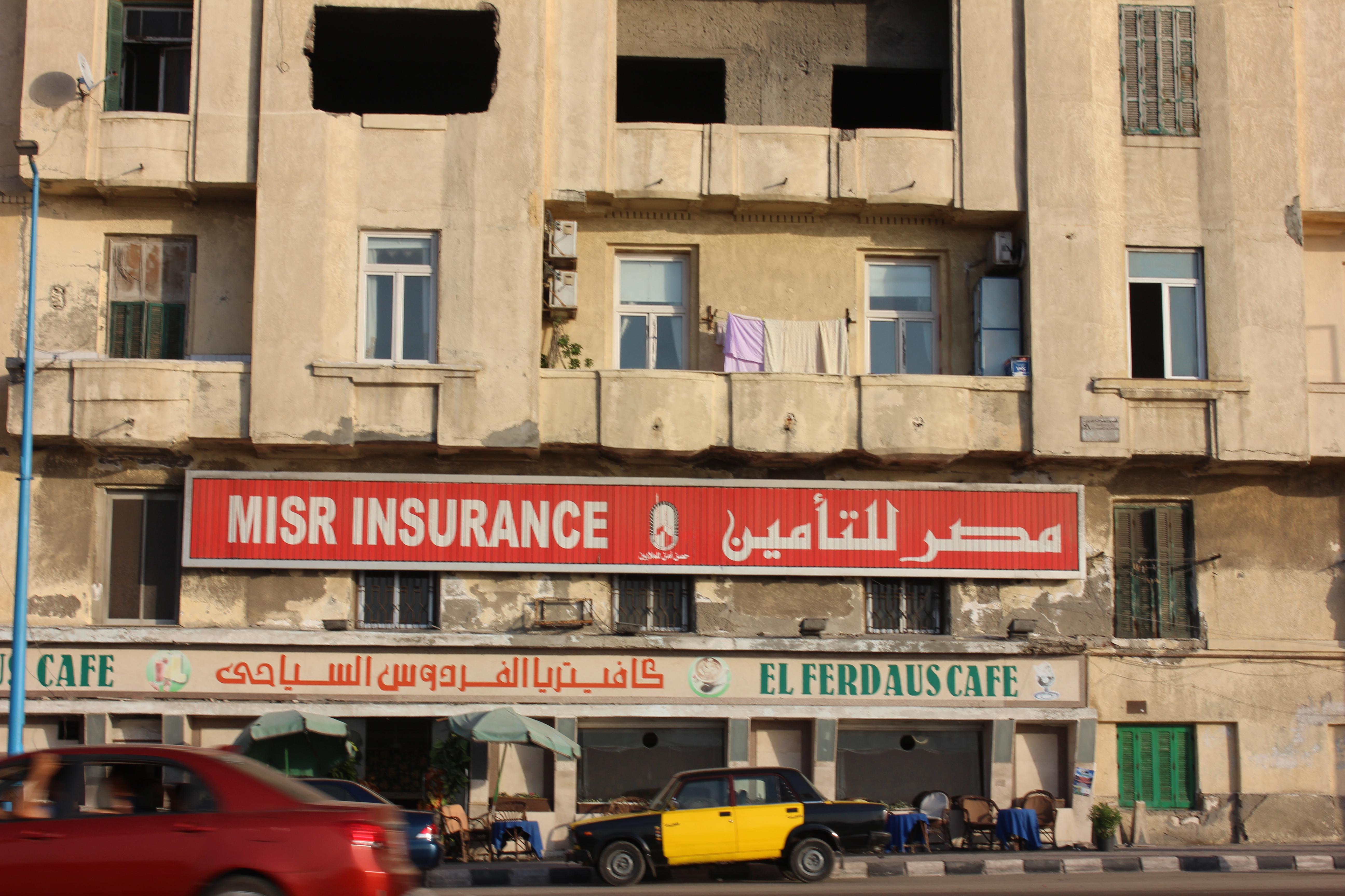 مباني الإسكندرية وبعض العلامات المميزة.